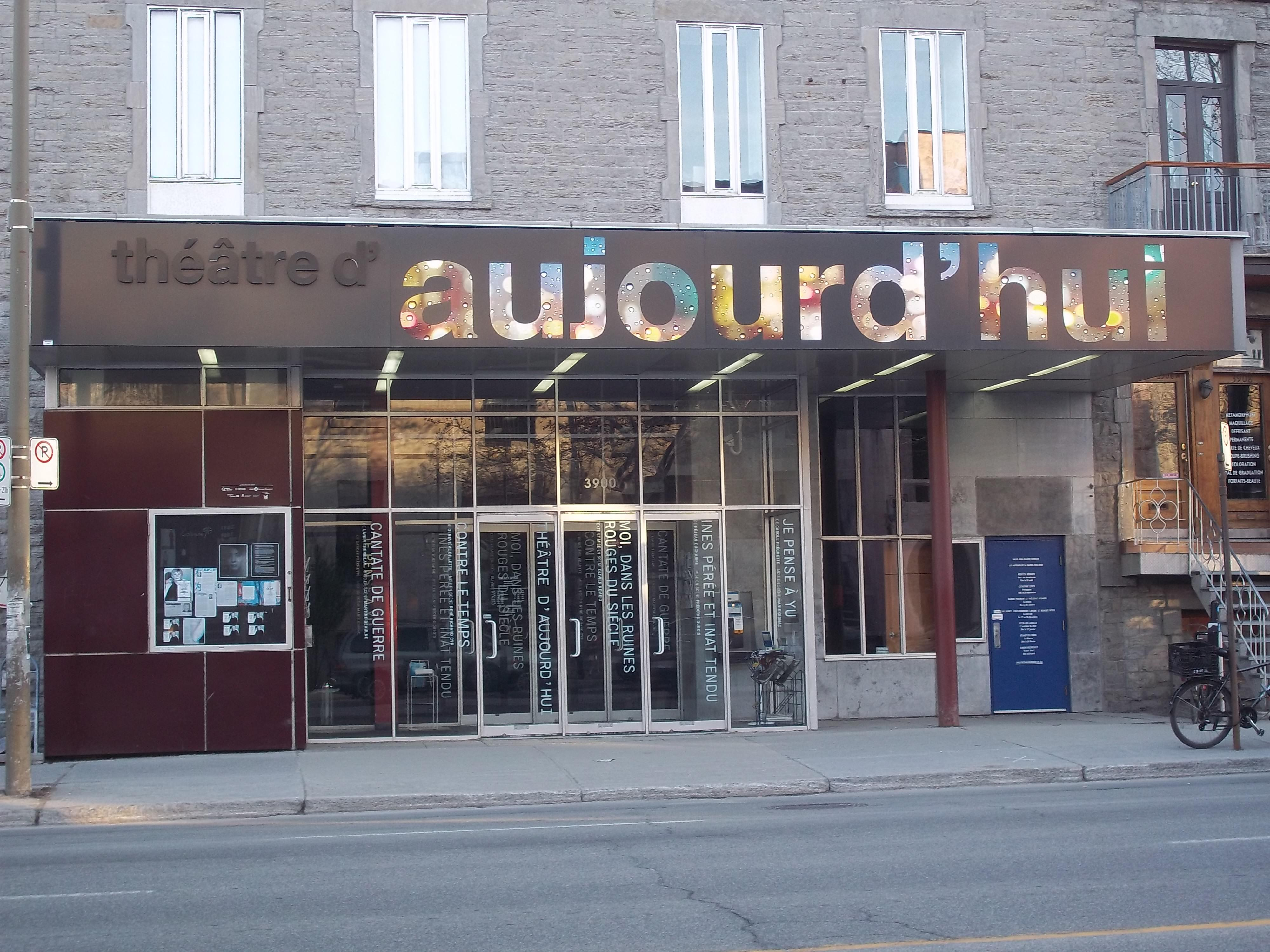 Le Théâtre d'Aujourd'hui est situé au 3900 rue Saint-Denis à Montréal